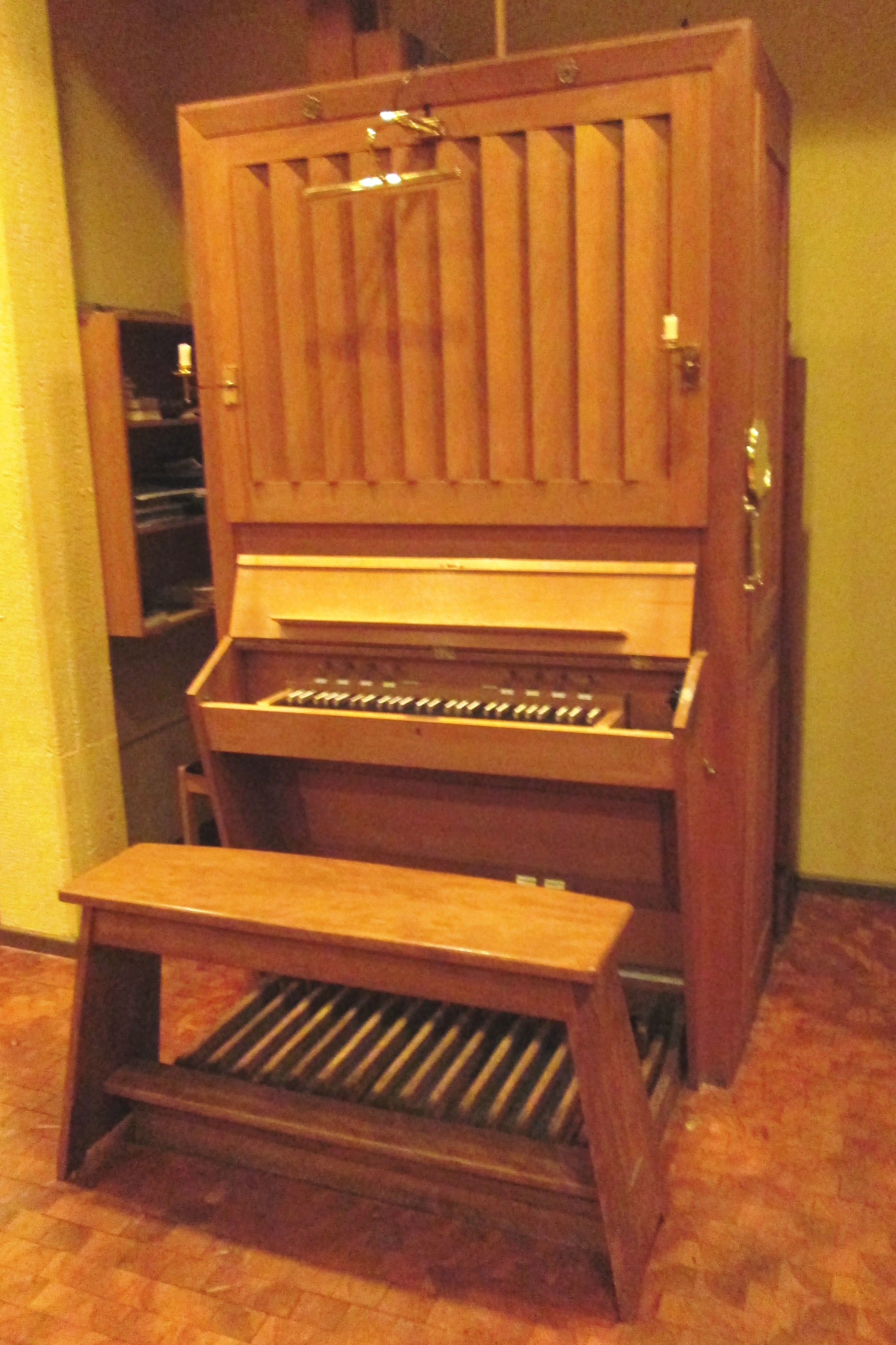 Orgel in der Kirche im Gemeinwesenzentrum Heerstraße-Nord, Berlin-Staaken